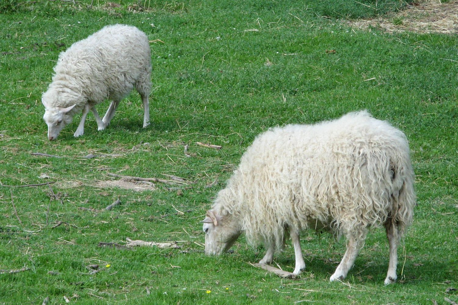 Skudden, Hausschafe (Ovis aries) im Tiergarten Weilburg